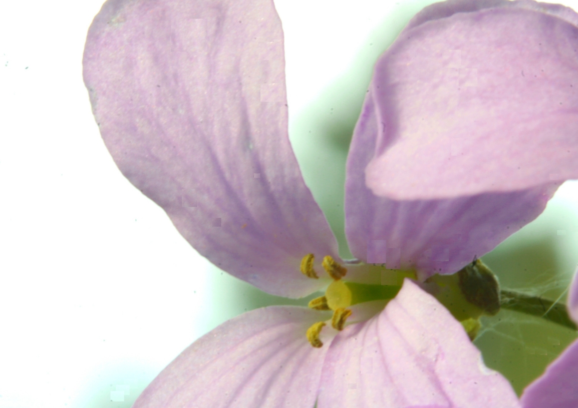 Cardamine_bulbifera (Dentaria Minore) Località : Melere, Trichiana (BL), 843 m s.l.m.